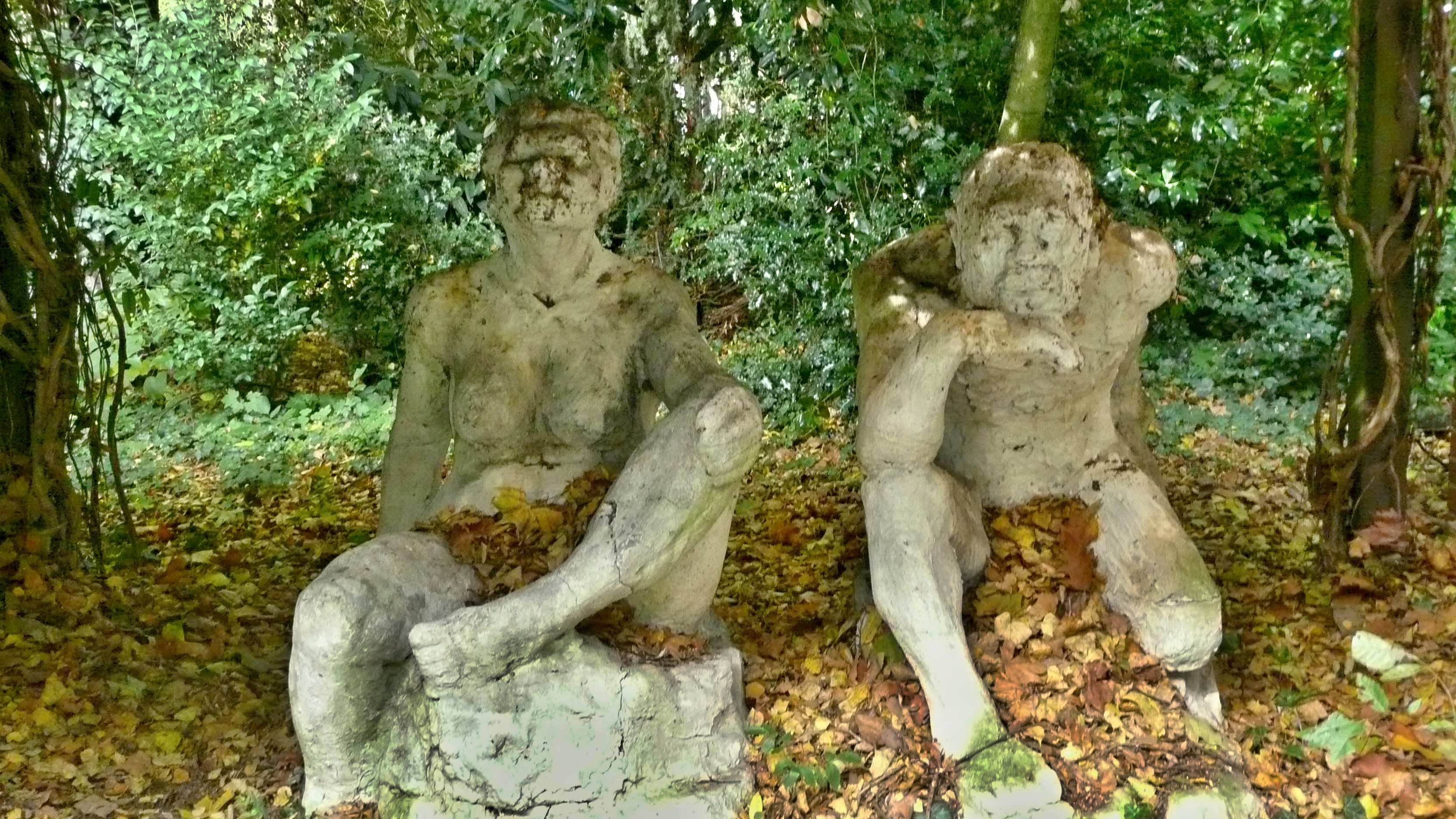 Hilden, Plastiken, Tatendrang & In Gedanken versunken, Künstlerhaus, Stadtpark